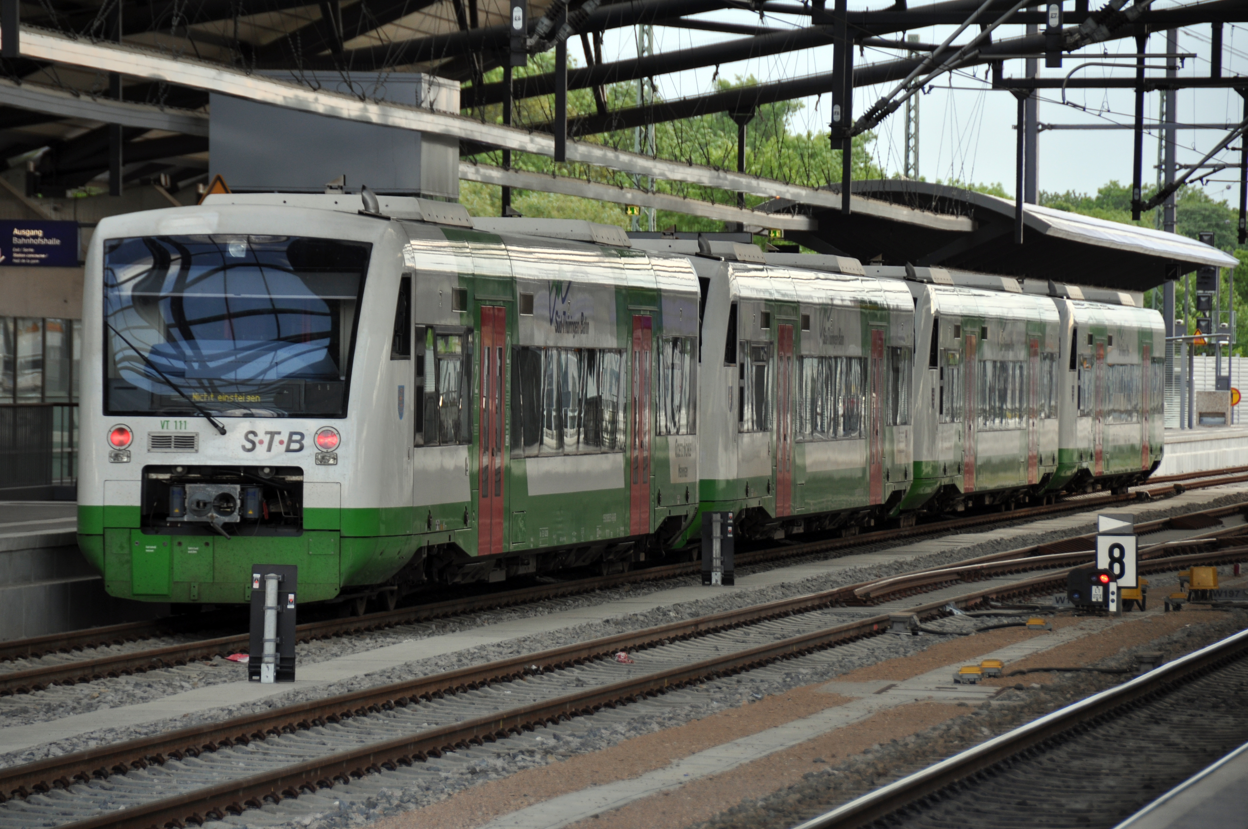 Erfurt Hauptbahnhof